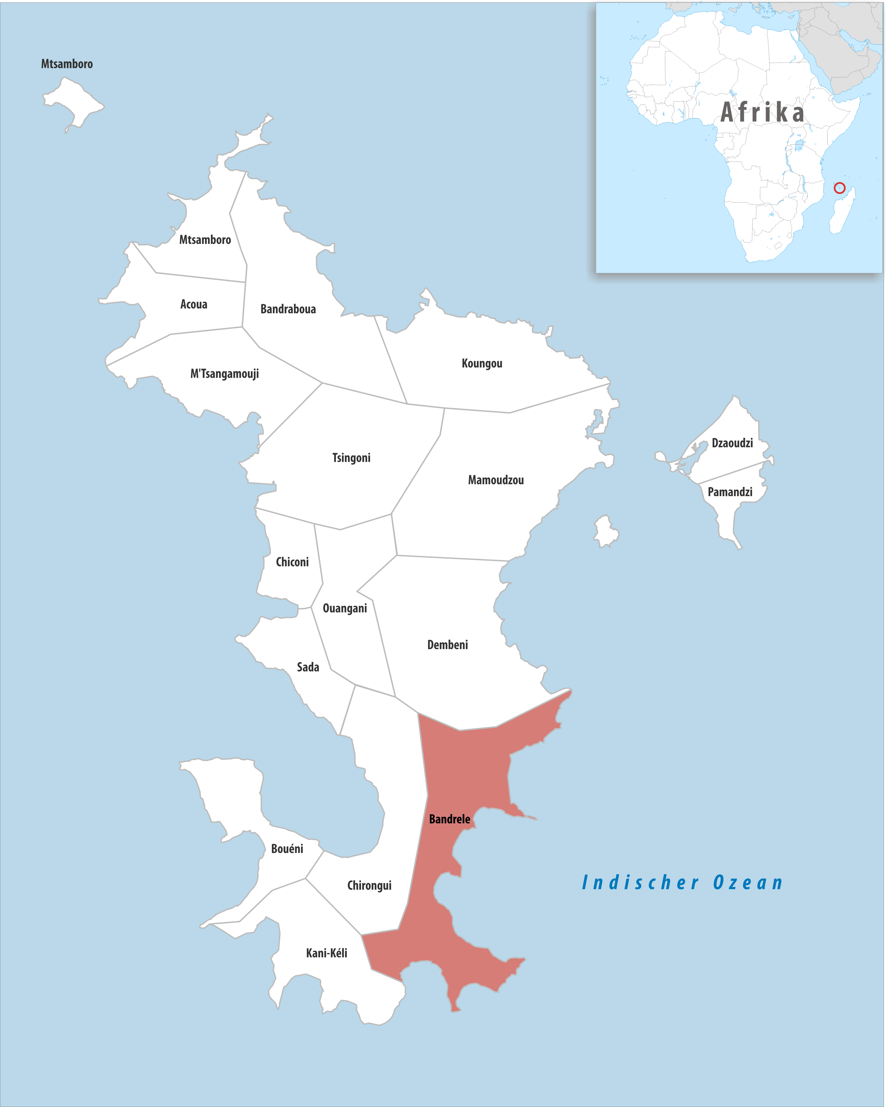 Lage der Gemeinde Bandrele